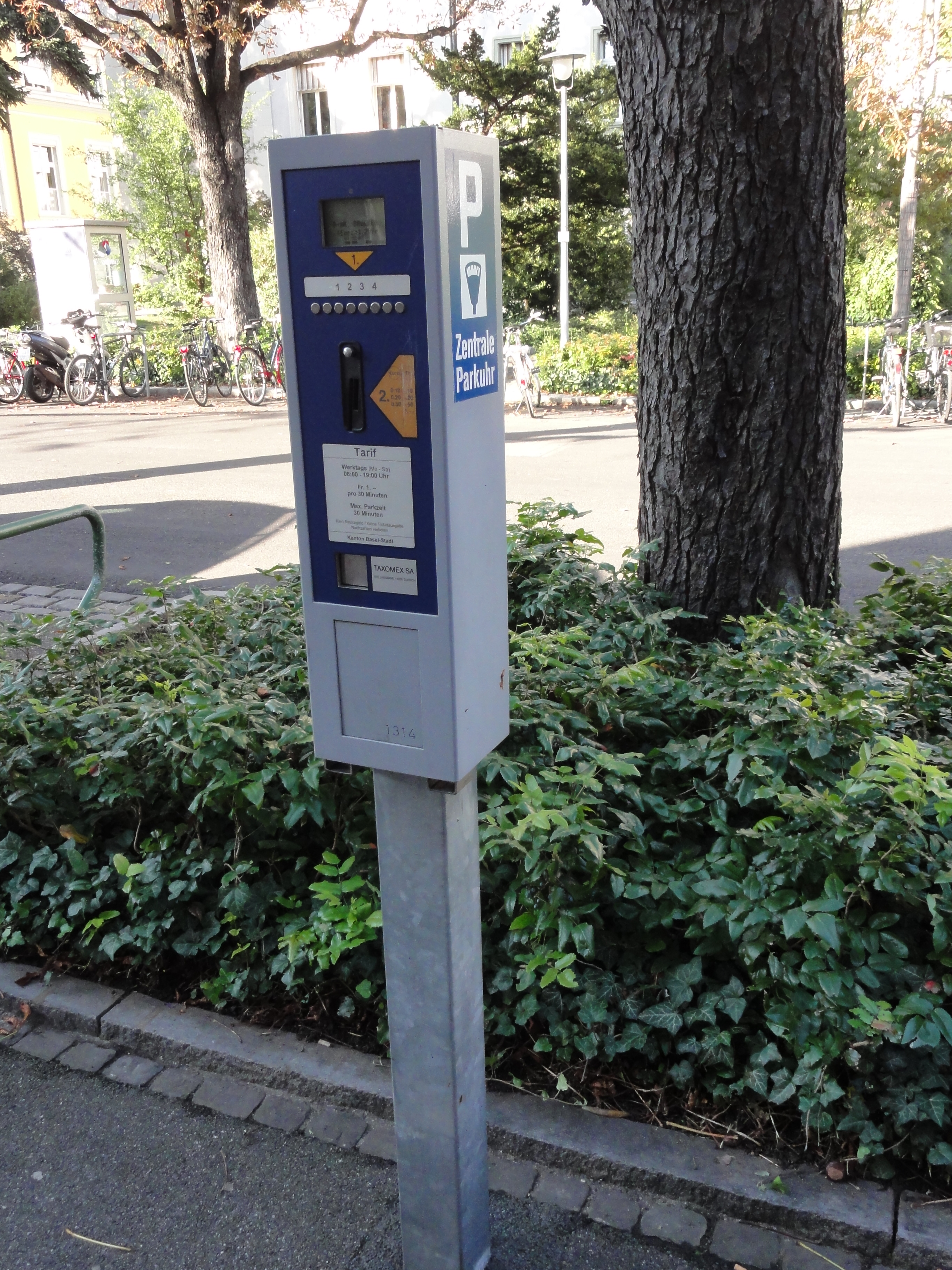 Basel, Bernoullistrasse — Parkscheinverkaufsautomat